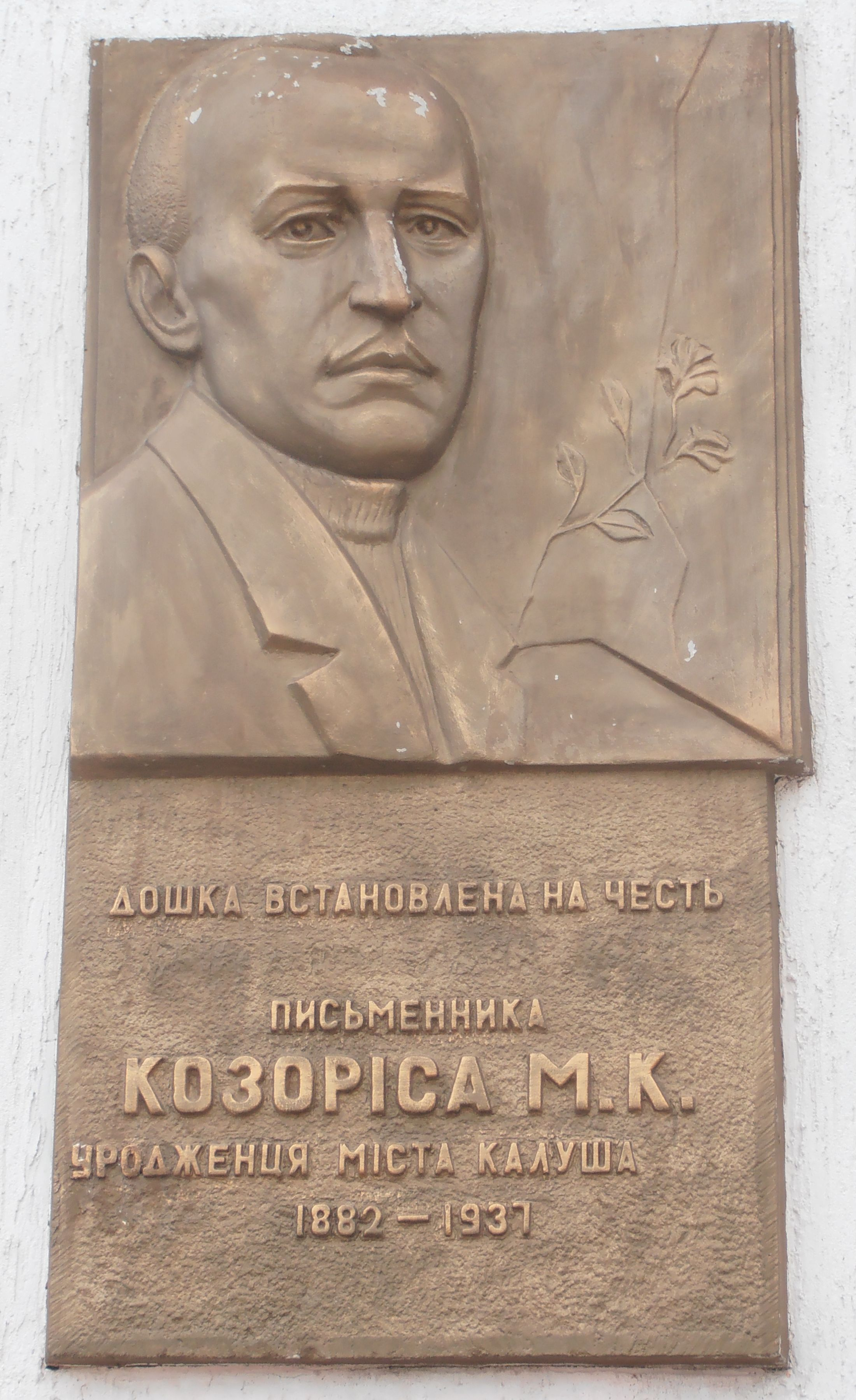 Меморіальна дошка Козорісу